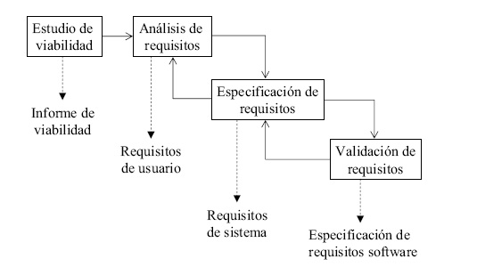 Diagrama que modela la secuencia de tareas para realizar la captura y análisis de requisitos software.